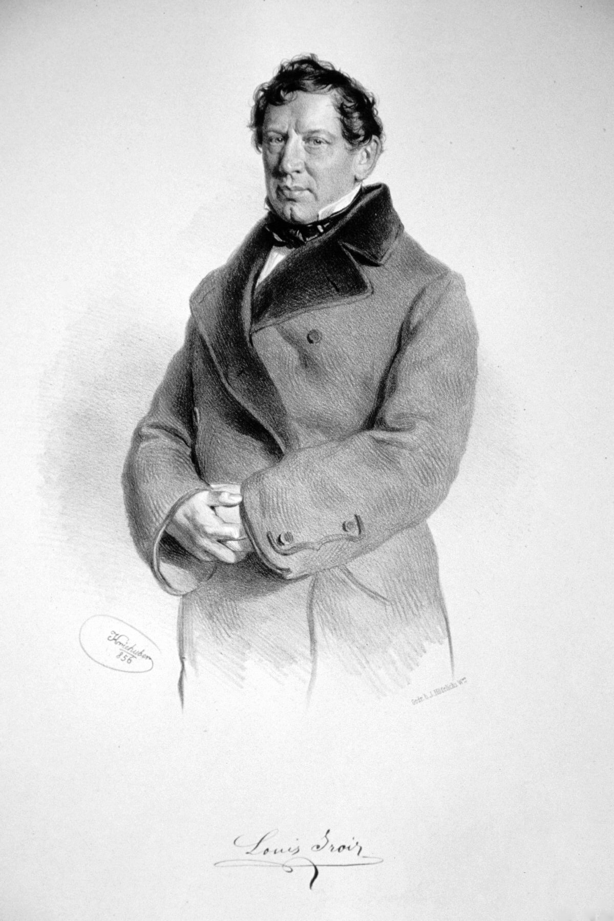 Alois (Louis) Grois (1809-1874), österreichischer Schauspieler, Komiker, Bassist. Lithographie von Josef Kriehuber, 1856